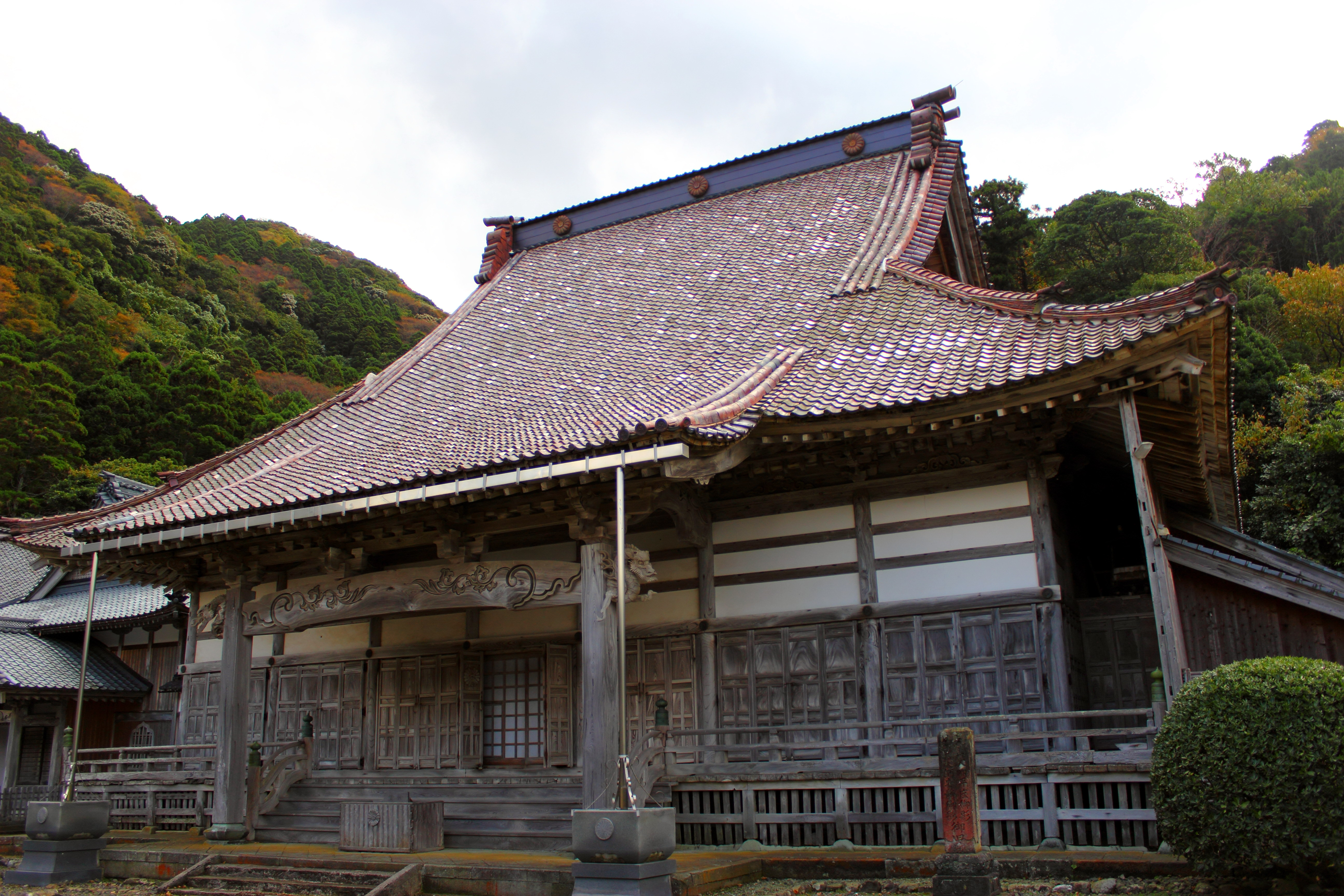 法雲寺 (福井市)本堂